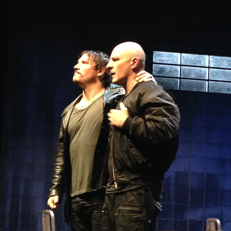 "Lluvia Constante" Teatro Bellas Artes de Madrid